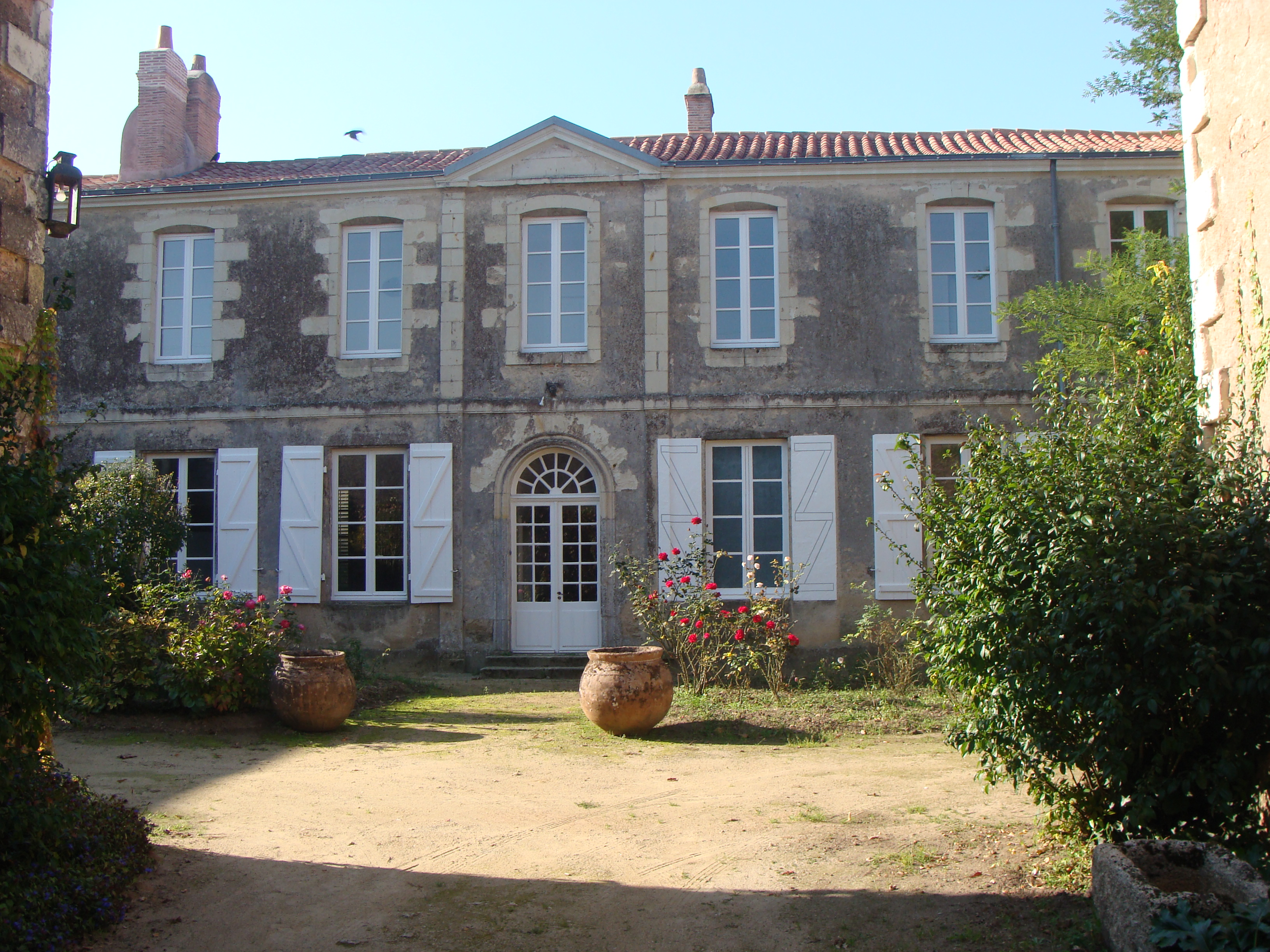 construction 18e S .